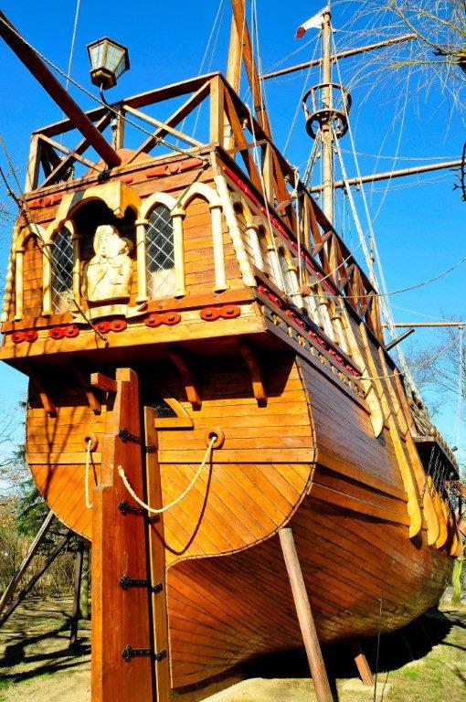 Replika w skali 1:1 statku Krzysztofa Kolumba Santa Marii, która znajduje się w Muzeum Arkadego Fiedlera